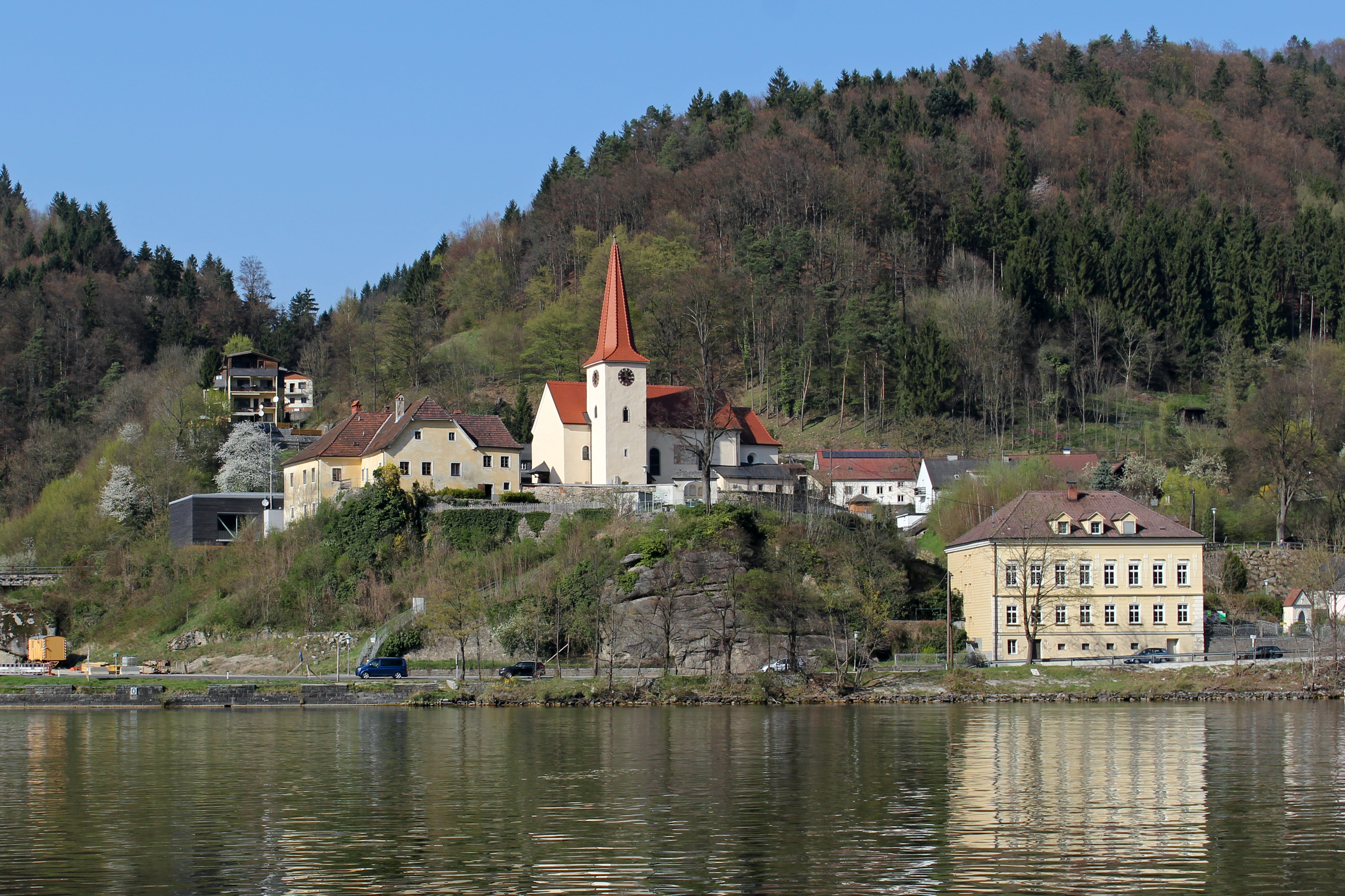 Kath. Pfarrkirche Hl. Nikolaus mit Pfarrhof und Volksschule (und Wegkapelle) Wegkapelle